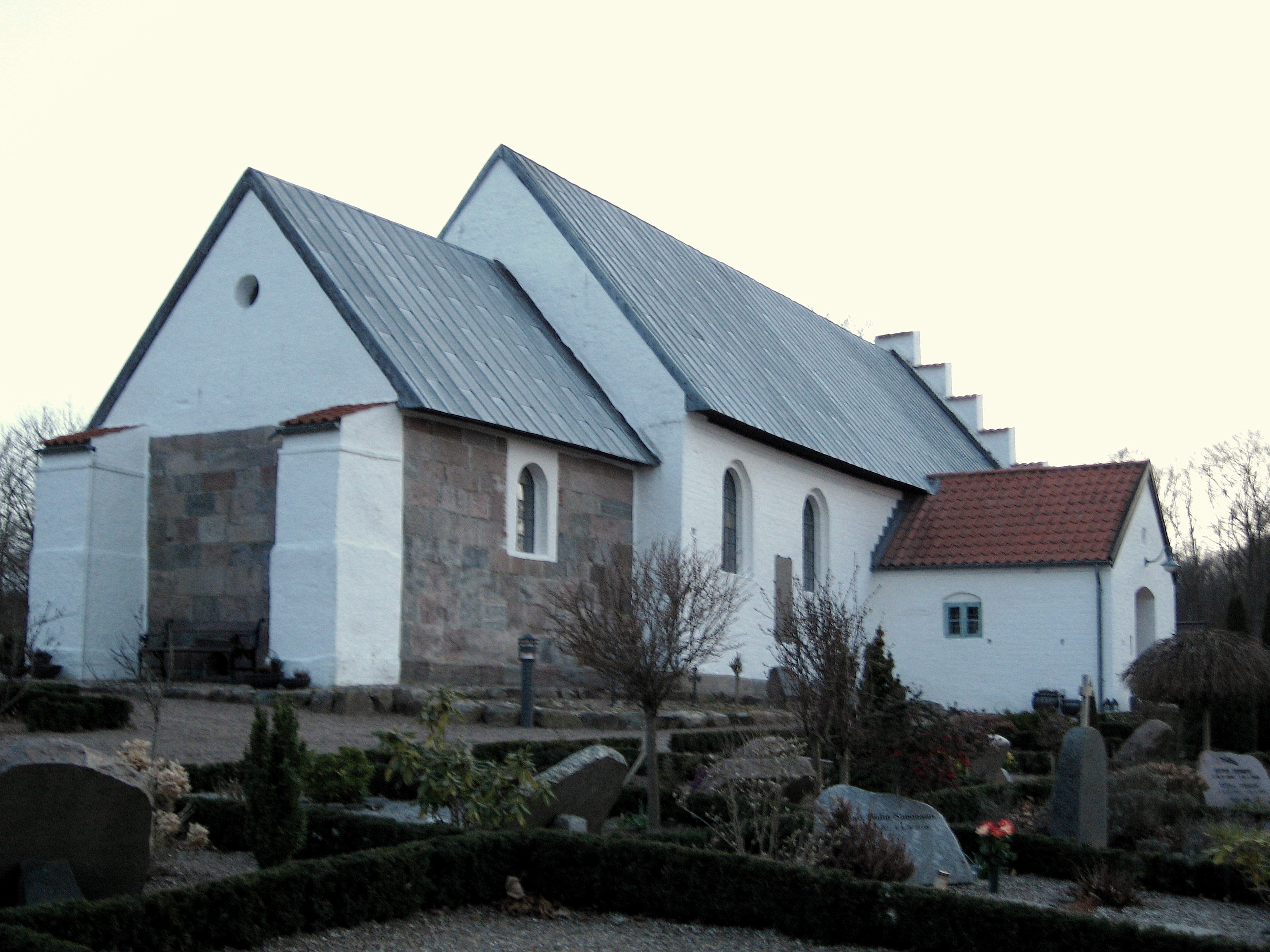 Sindal Gl. Kirke